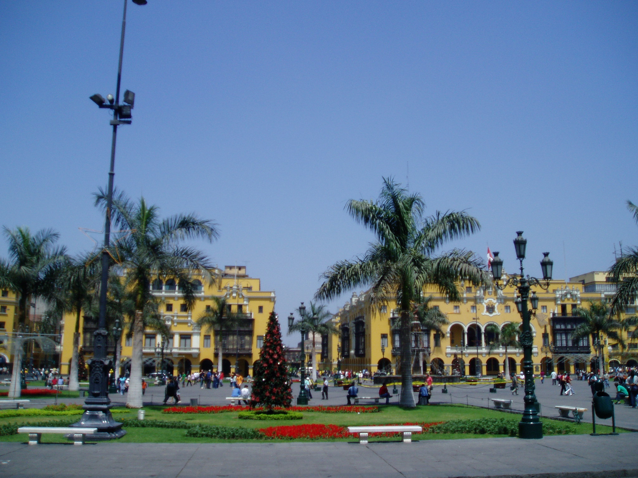 Ido: Quartero di San Isidro, en Lima.